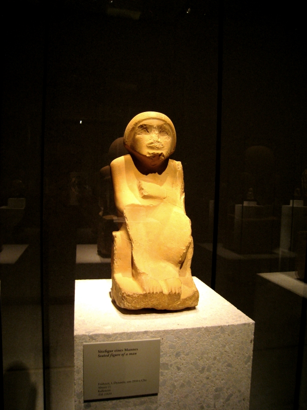 Statue d'un dignitaire assis